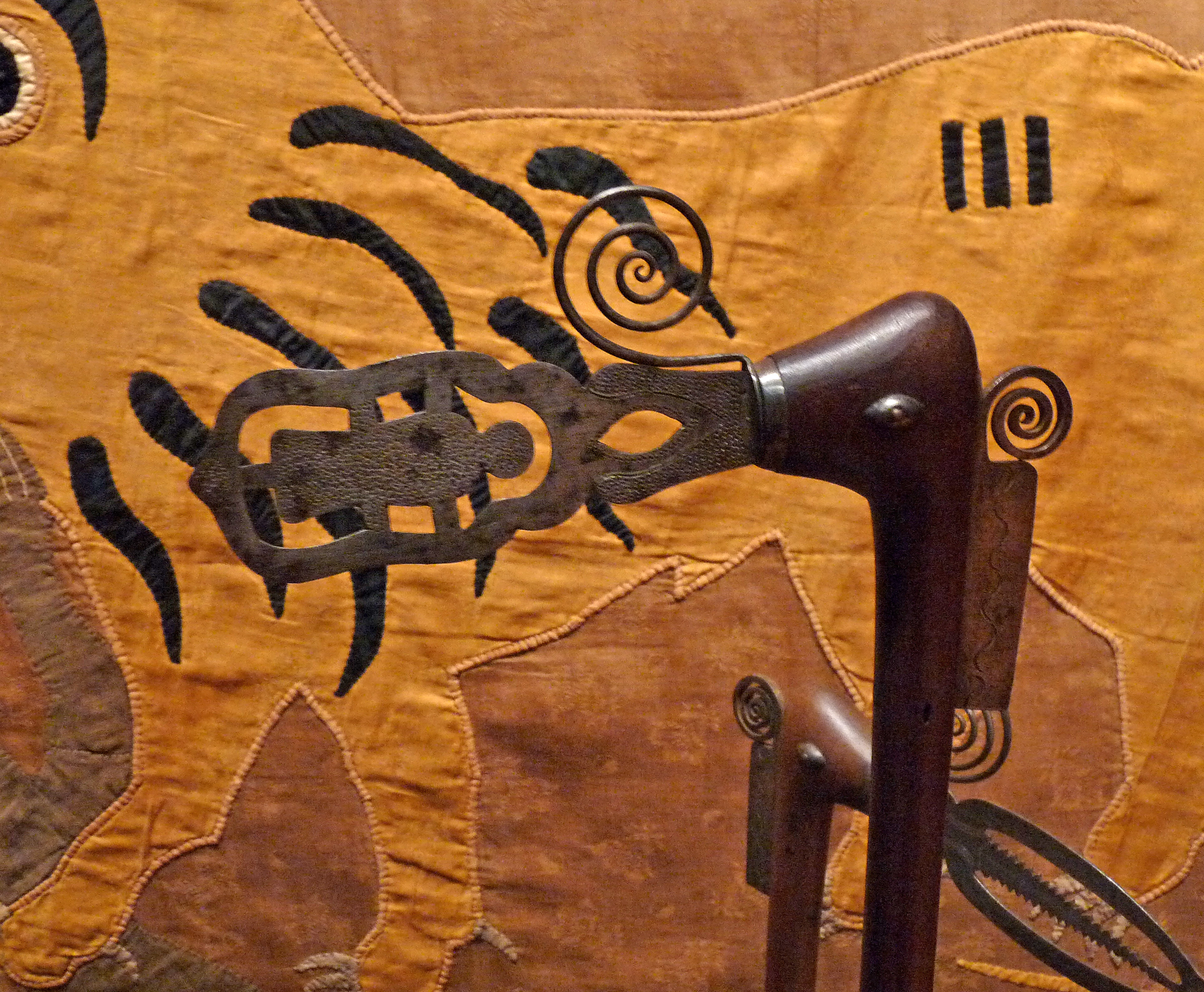 Récade dont la lame porte l'image d'un canon, emblème du roi Kpengla. Musée du quai Branly. N° inventaire : 71.1931.36.7